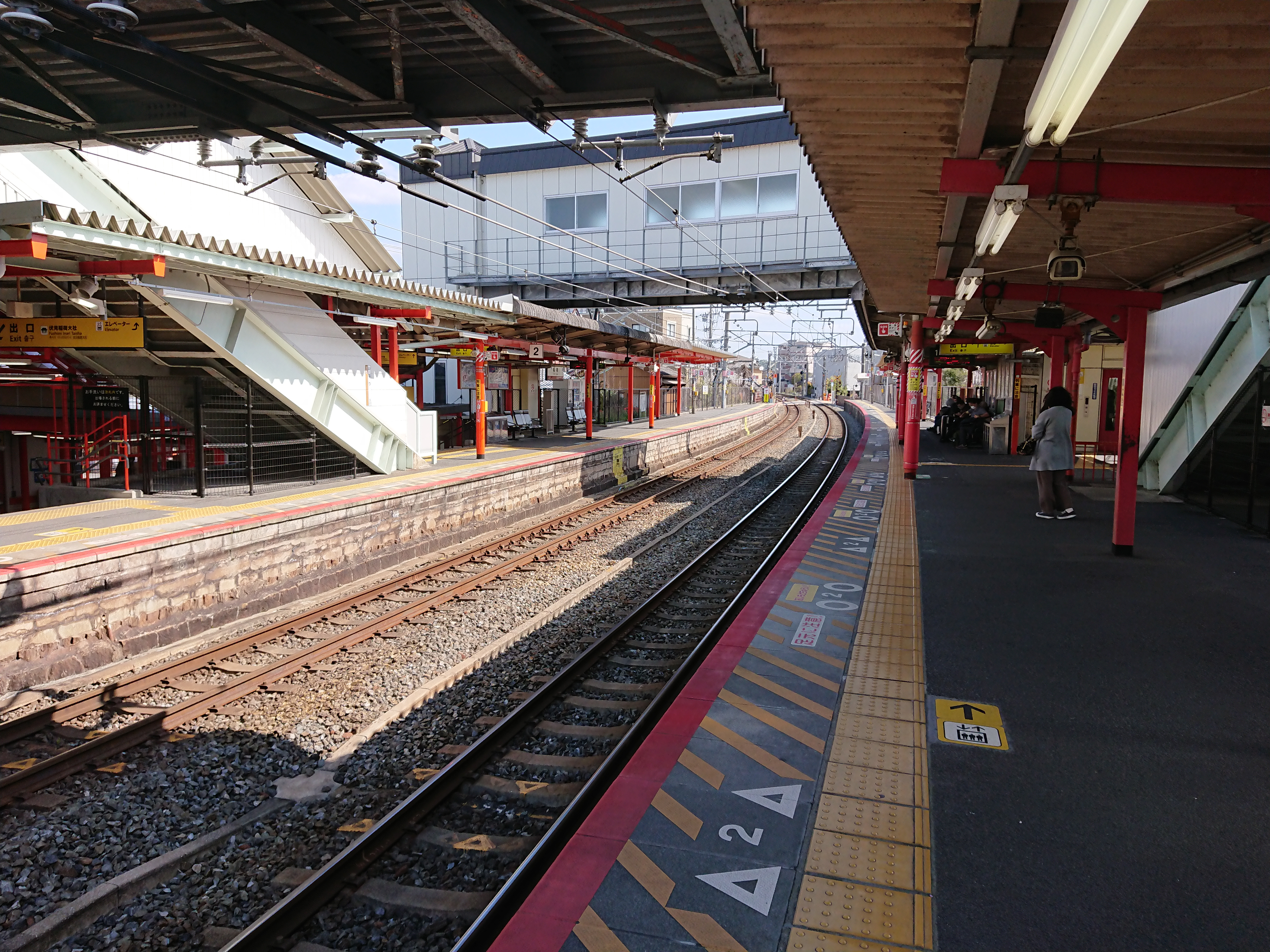 JR奈良線 稲荷駅プラットホーム（京都市伏見区）